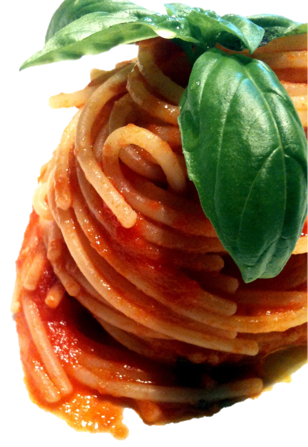 Immagine icona della tipica immagine degli spaghetti al pomodoro e basilico serviti in un piatto.